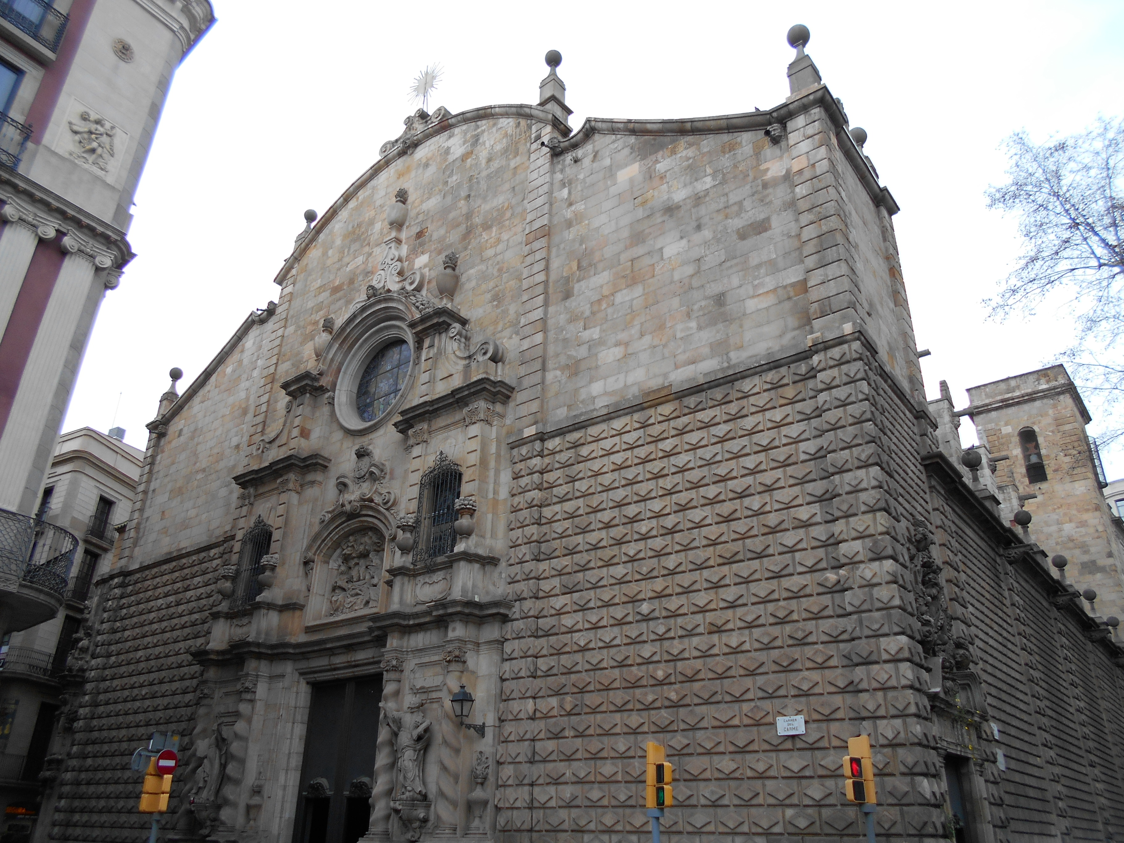 Iglesia de Belén.